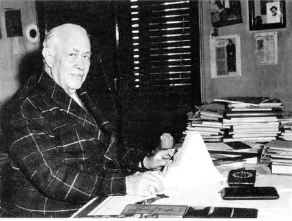 Casto Fernández-Shaw Iturralde.